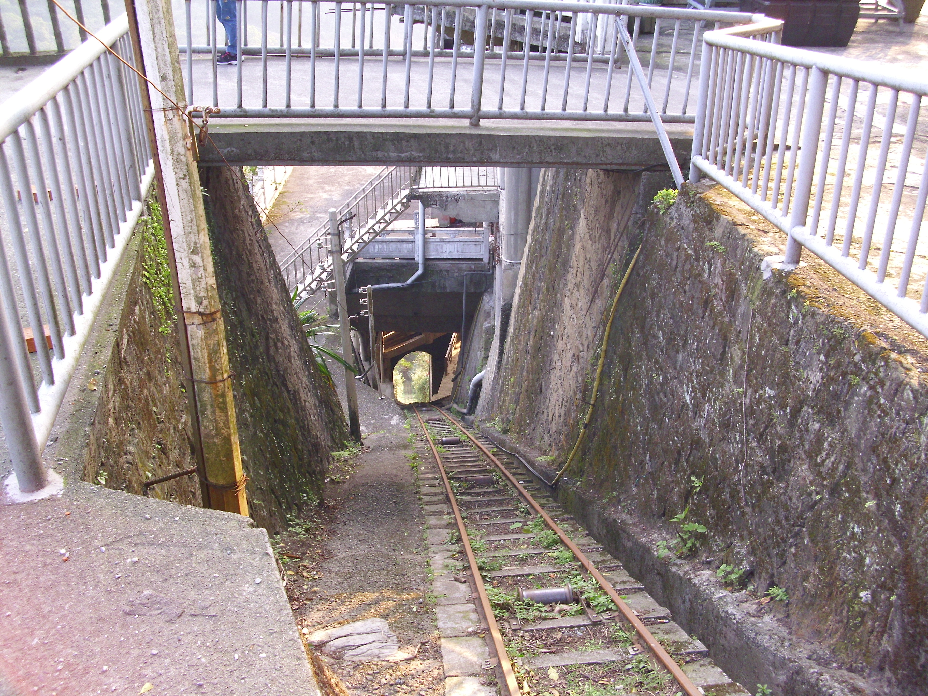 指南宮的zh:纜索鐵路